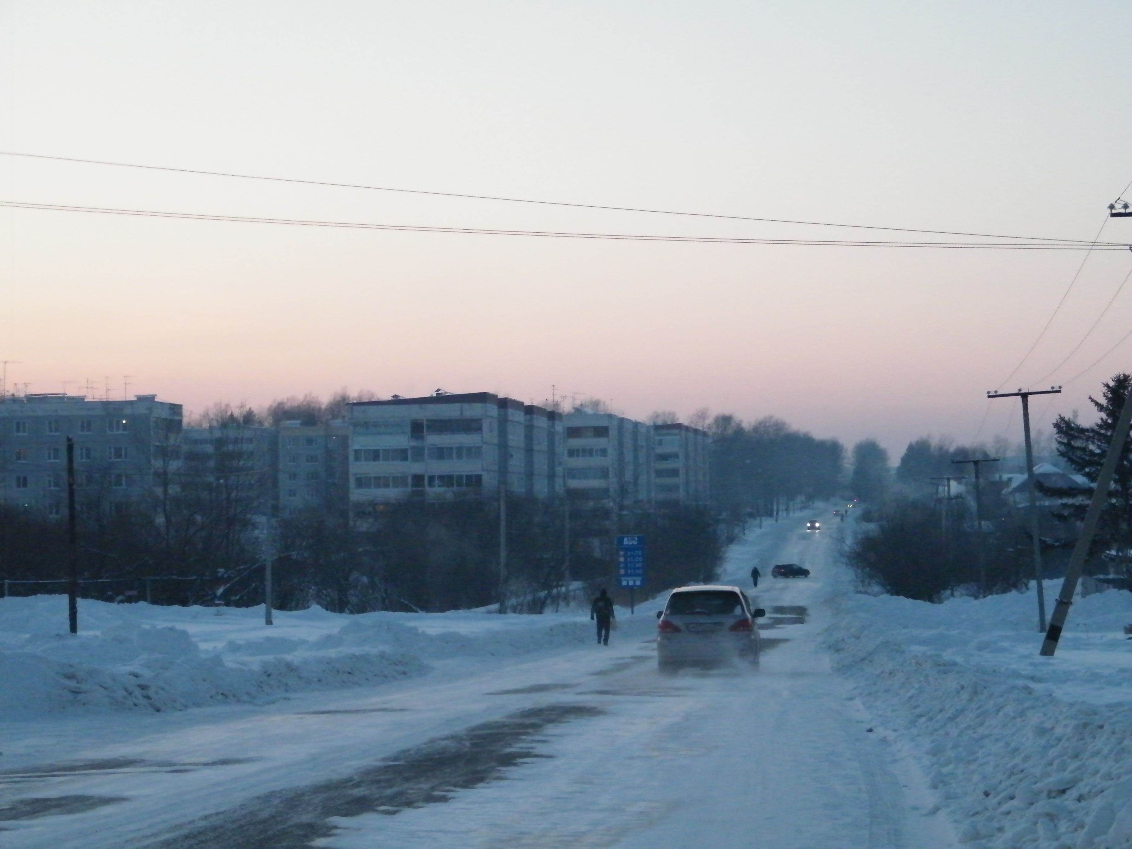 Село Некрасовка Хабаровский край